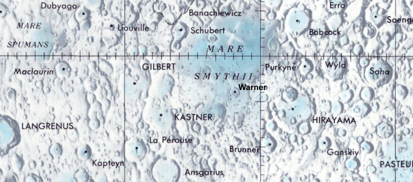 Cráter lunar Warner. Localización. (Lunar Chart LPC1. Second Edition)